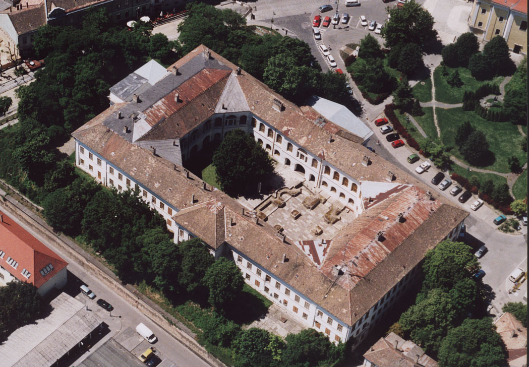 Megyeháza-Bencés Apátság maradványai - Szekszárd - Hungary - Europe